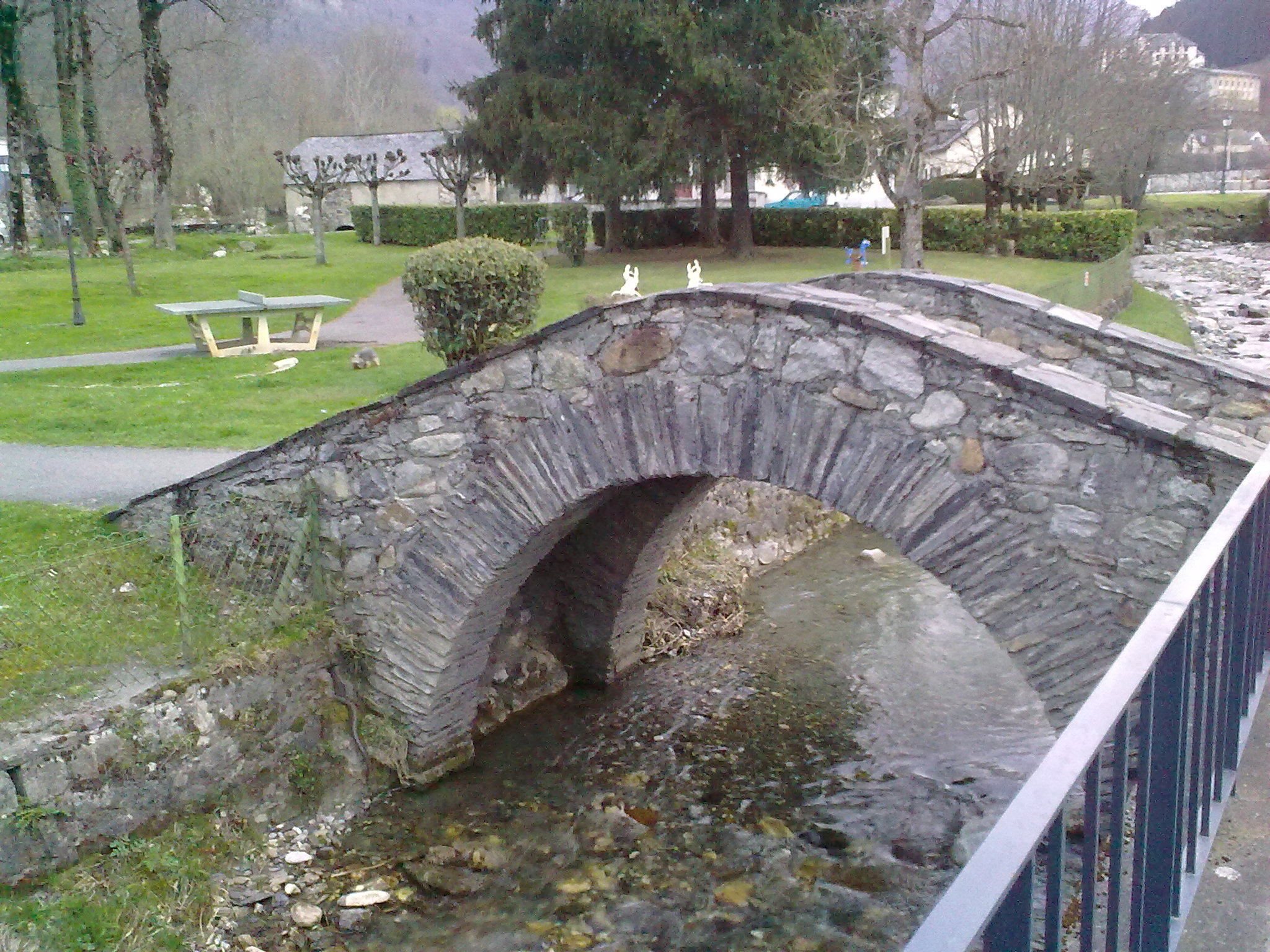 Arrens France